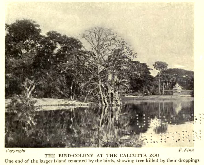 Heronry in calcutta zoo